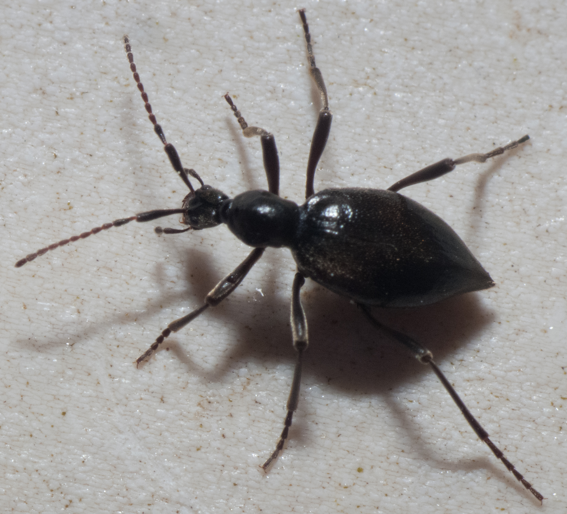 Escaravello, Oroso, Galiza IDENTIFICATION: Palaeostigus prolongatus (Gory, 1839) [det. S.E. Thorpe, 2012]